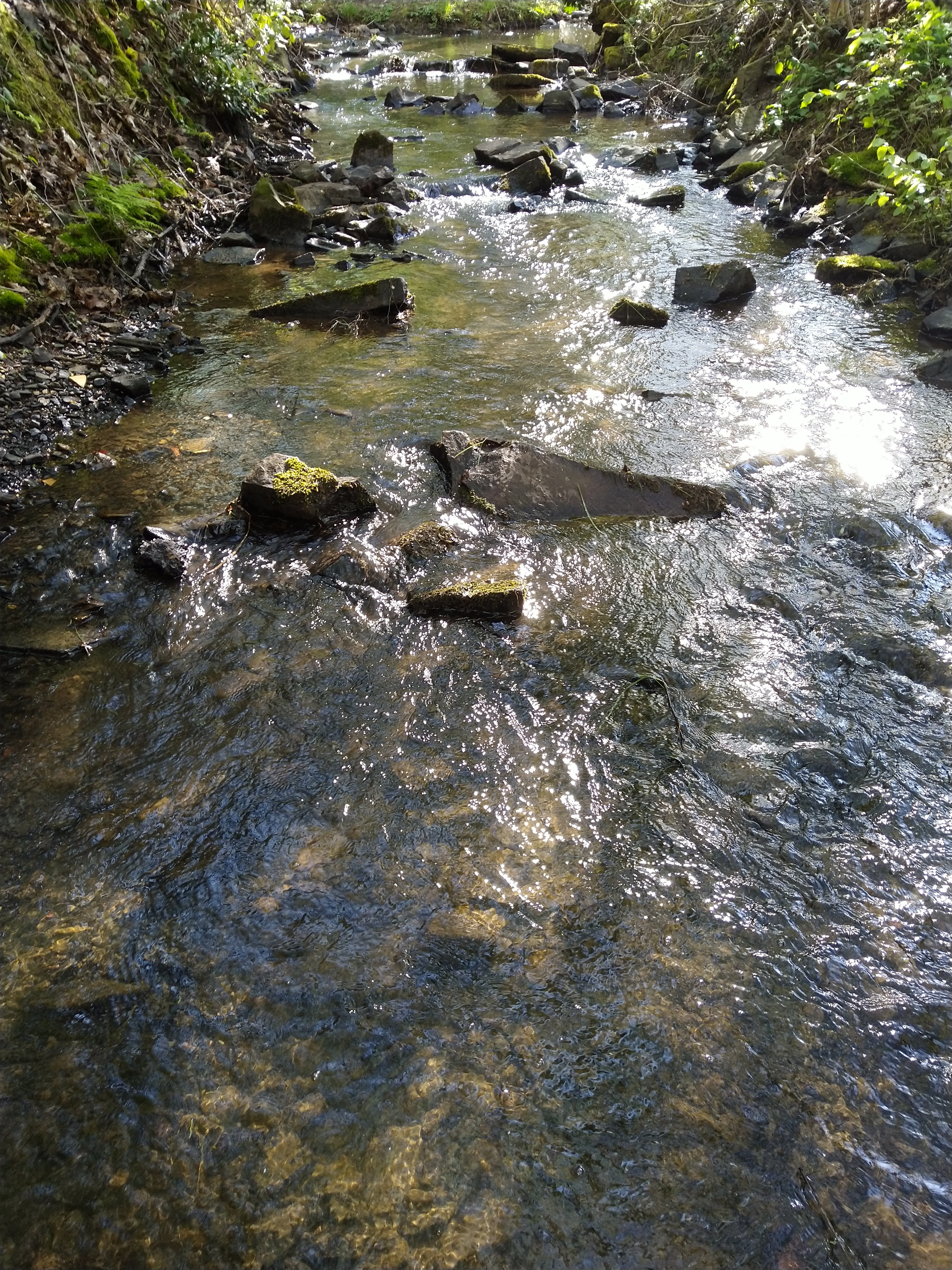 Aubach nahe der Quelle im Wald